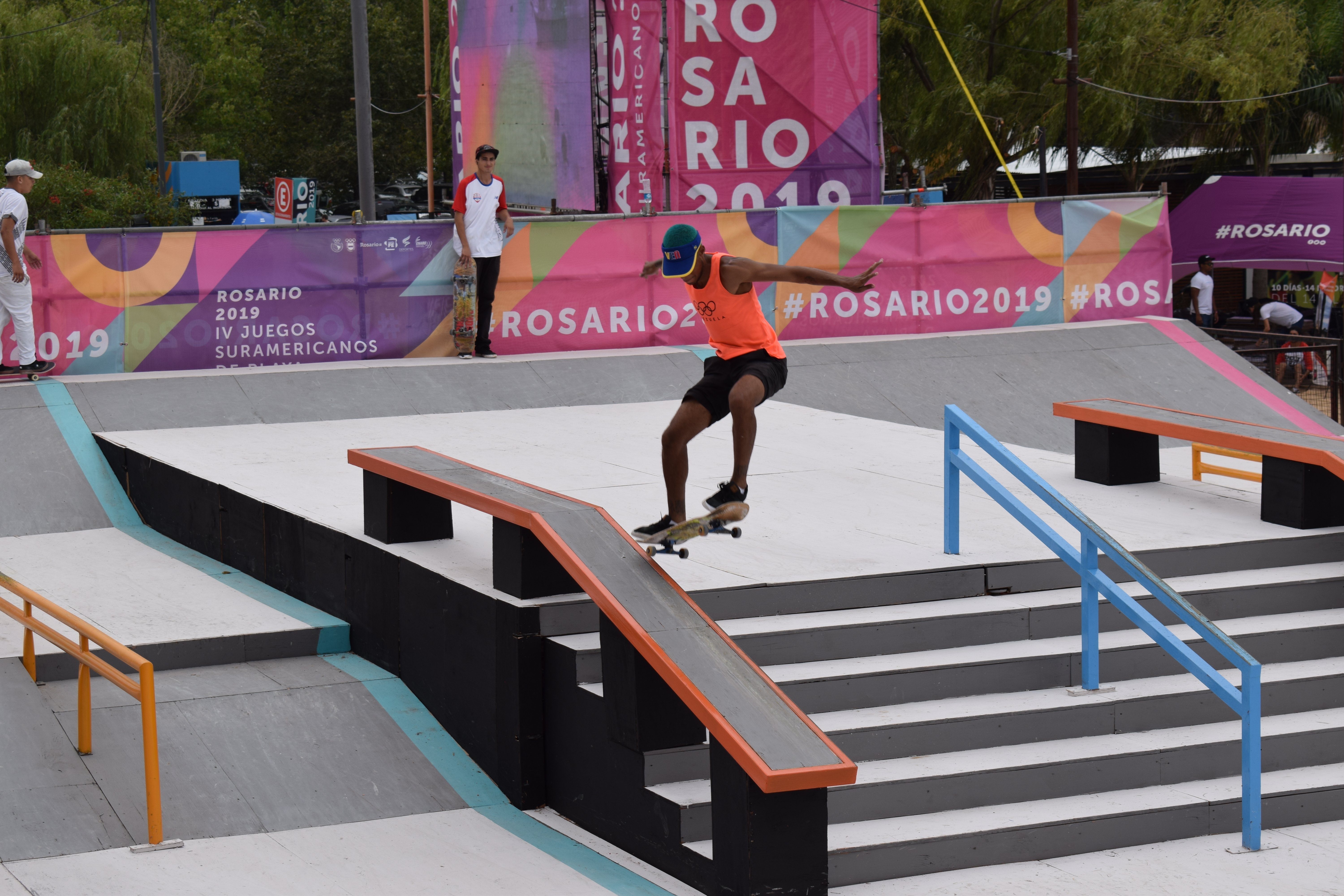 Skateboarding at the 2019 South American Beach Games – Mens' street